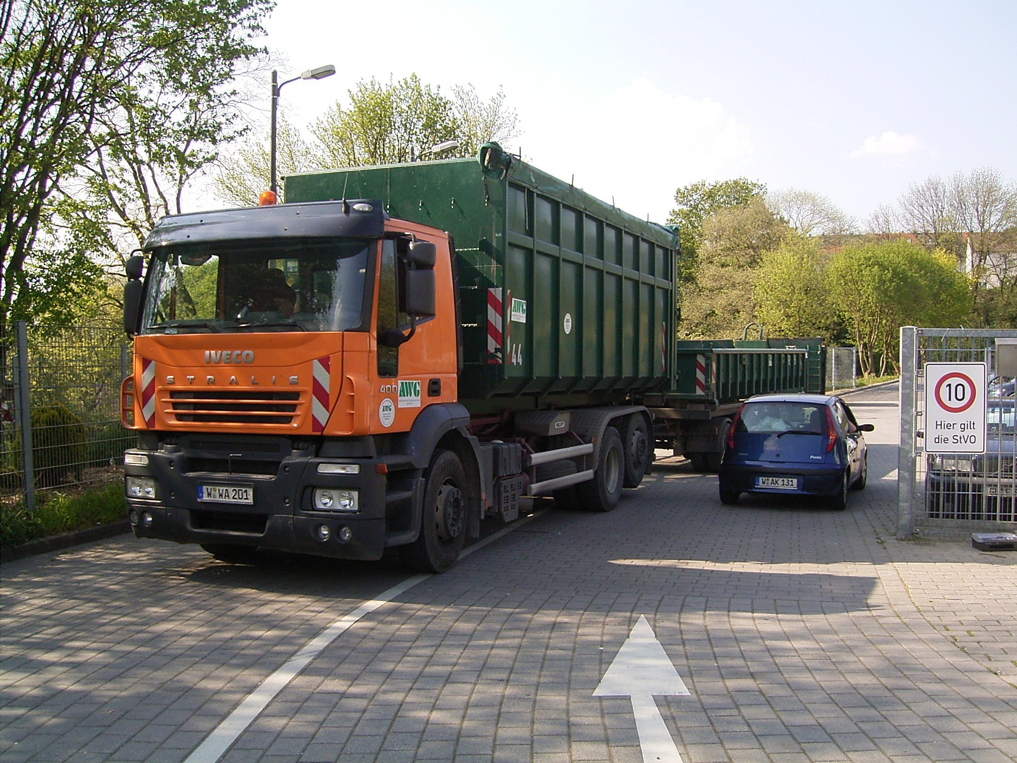 Recyclinghof Badische Straße in Wuppertal